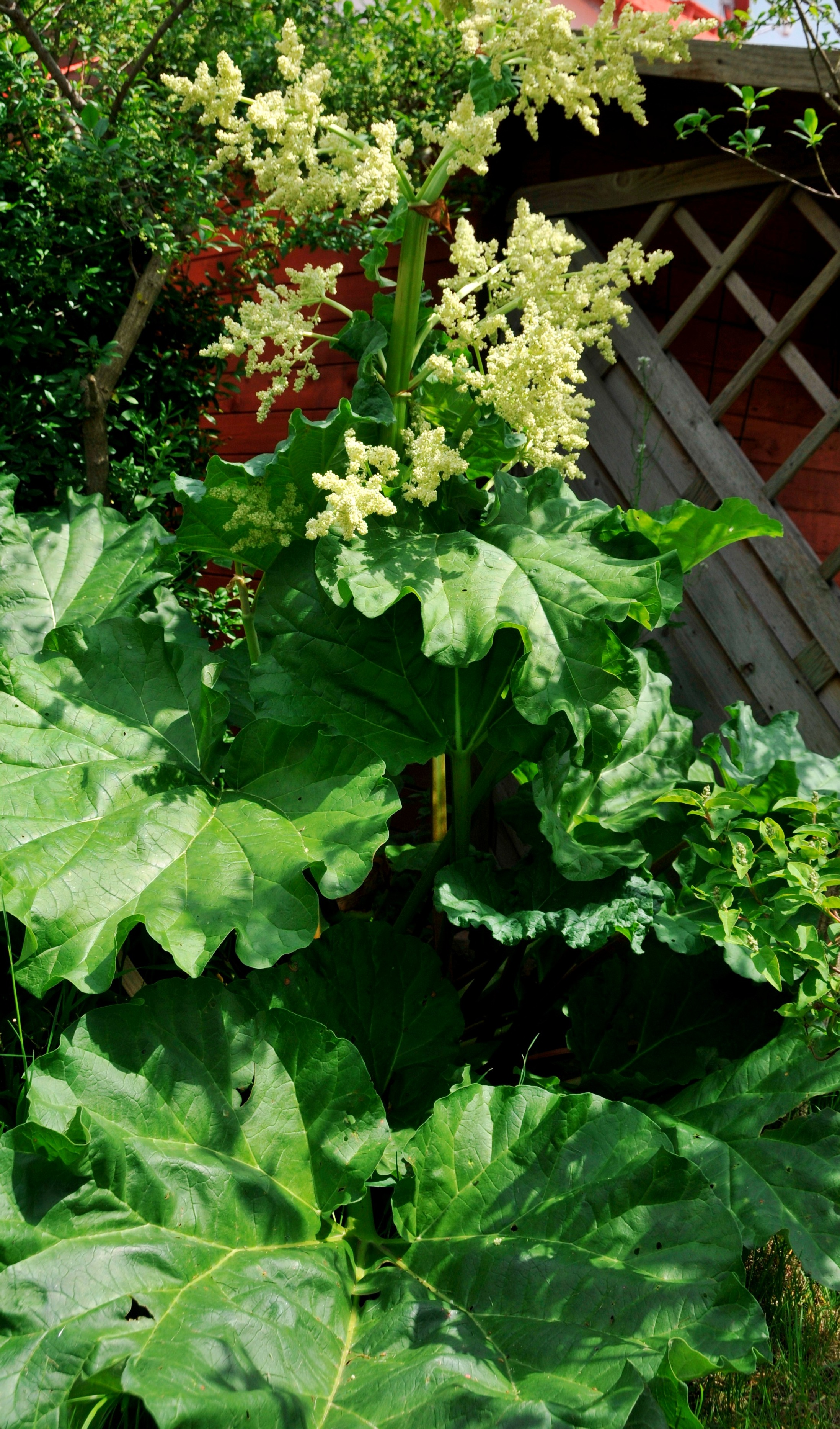 Rhabarber, Blütenstand